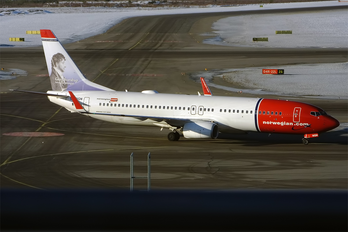 Norwegian (Georg Sverdrup livery), LN-NGN, Boeing 737-8JP